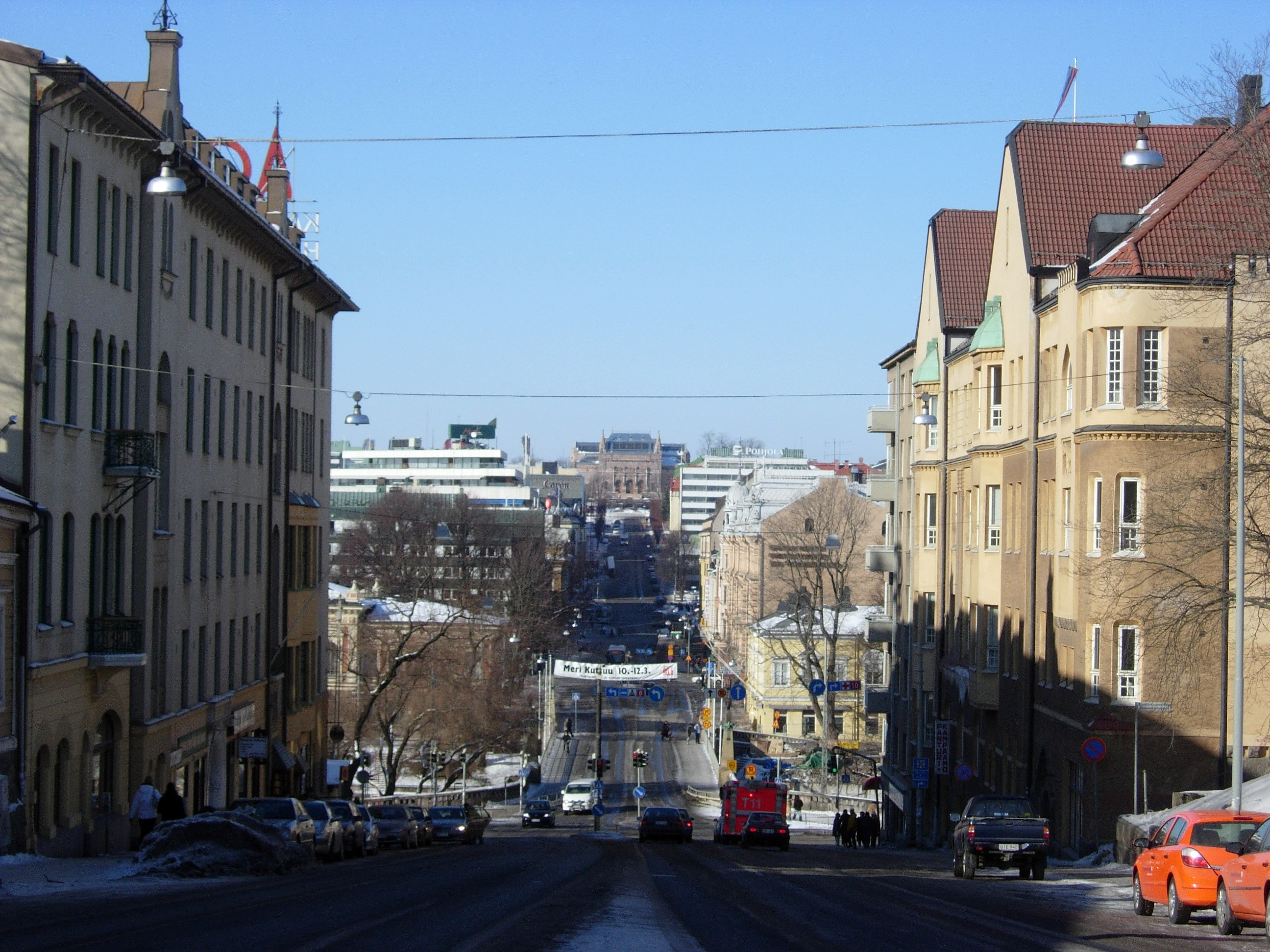 Näkymä Kaskenkadun päältä yli Aurasillan.